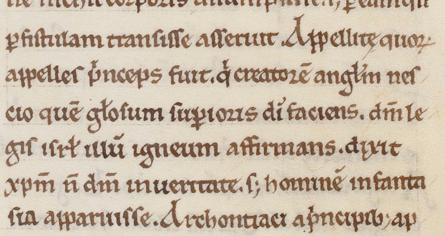 Исидор Севильский в книге Этимологии о апеллианах. Рукопись XIII века. Национальная библиотека Франции